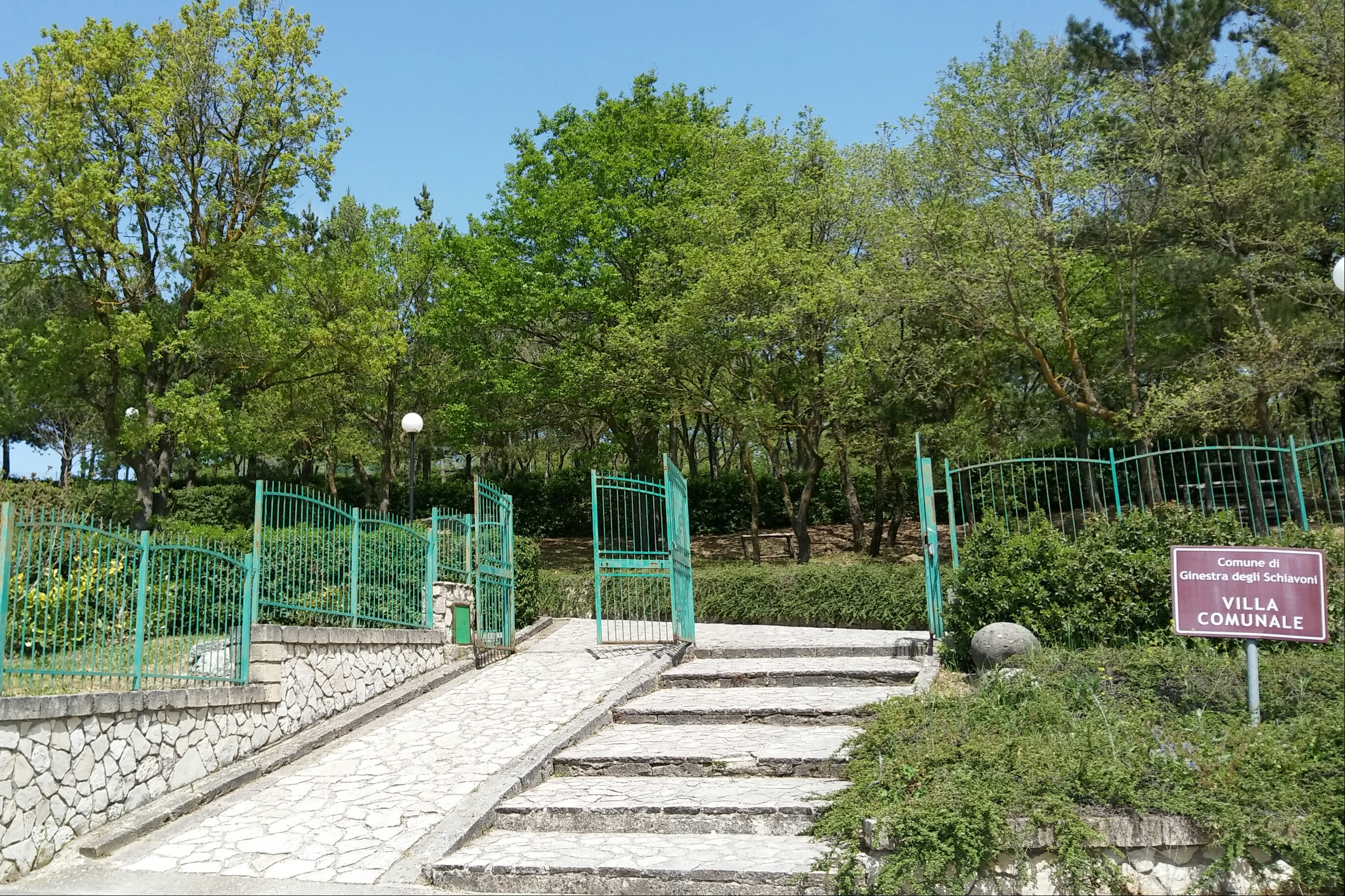 Villa Comunale in Ginestra degli Schiavoni, Italy